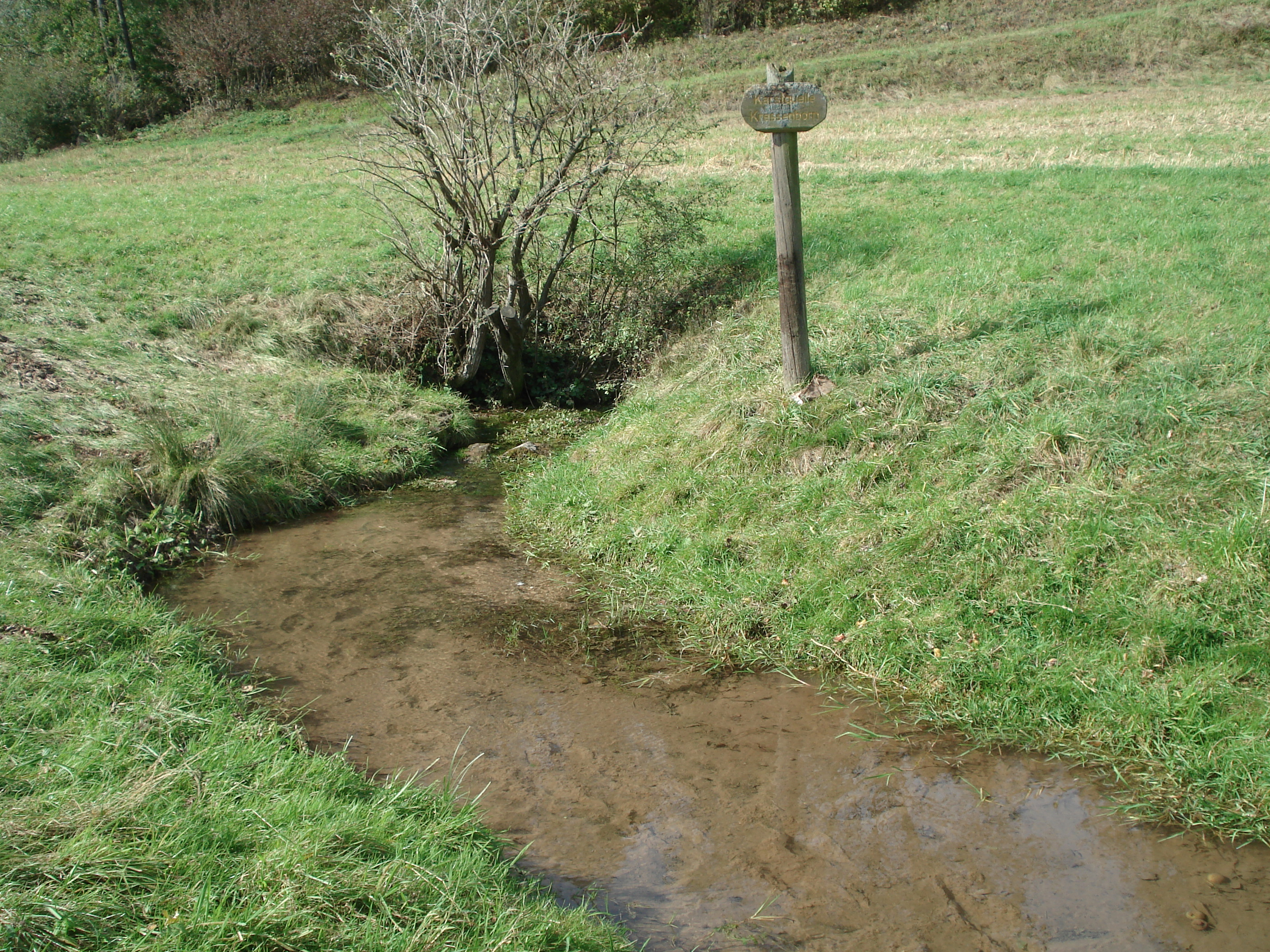 Die Karstquelle Kressenborn